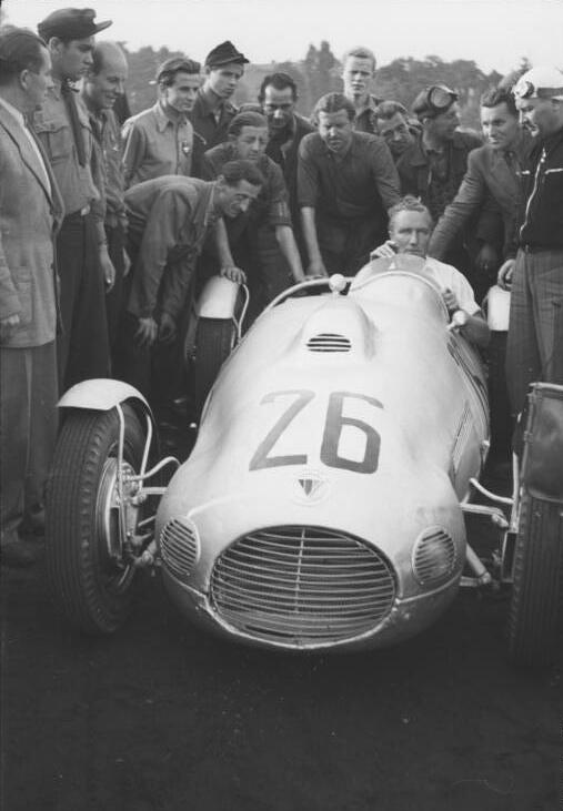 Zentralbild/Junge, 15.8.1951 Zu den III. Weltfestspielen in Berlin. Motorradrennen unter Teilnahme von Spitzenfahrern der DDR und westdeutschen Fahrern anlässlich des grossen Volksfestes auf der Trabrennbahn in Karlshorst am 15.8.1951. Der bekannte deutsche Rennfahrer Manfred von Brauchitsch fährt als Gast eine Ehrenrunde. Information added by Wikimedia users.